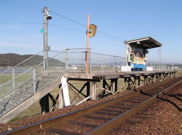 下石野駅